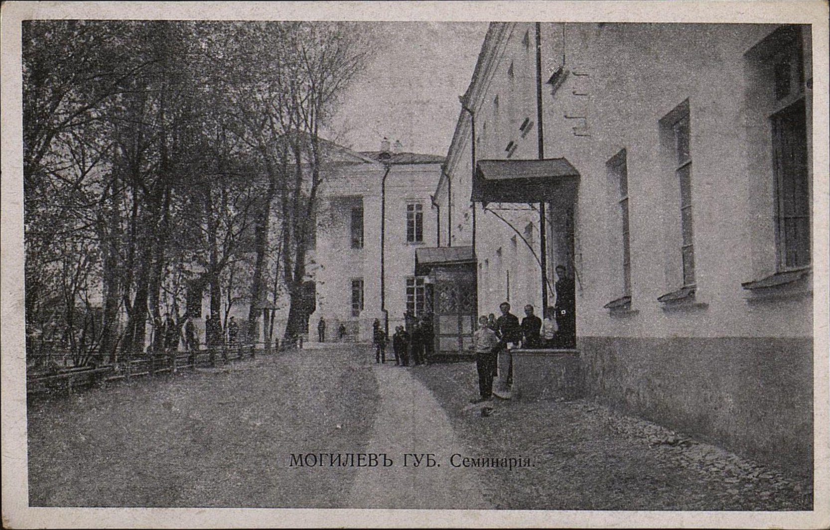 Беларуская (тарашкевіца): Магілёў (Mahiloŭ), рог вуліцы Ветранай (vulica Vietranaja) і завулка Фарнага (zavułak Farny). Духоўная сэмінарыя